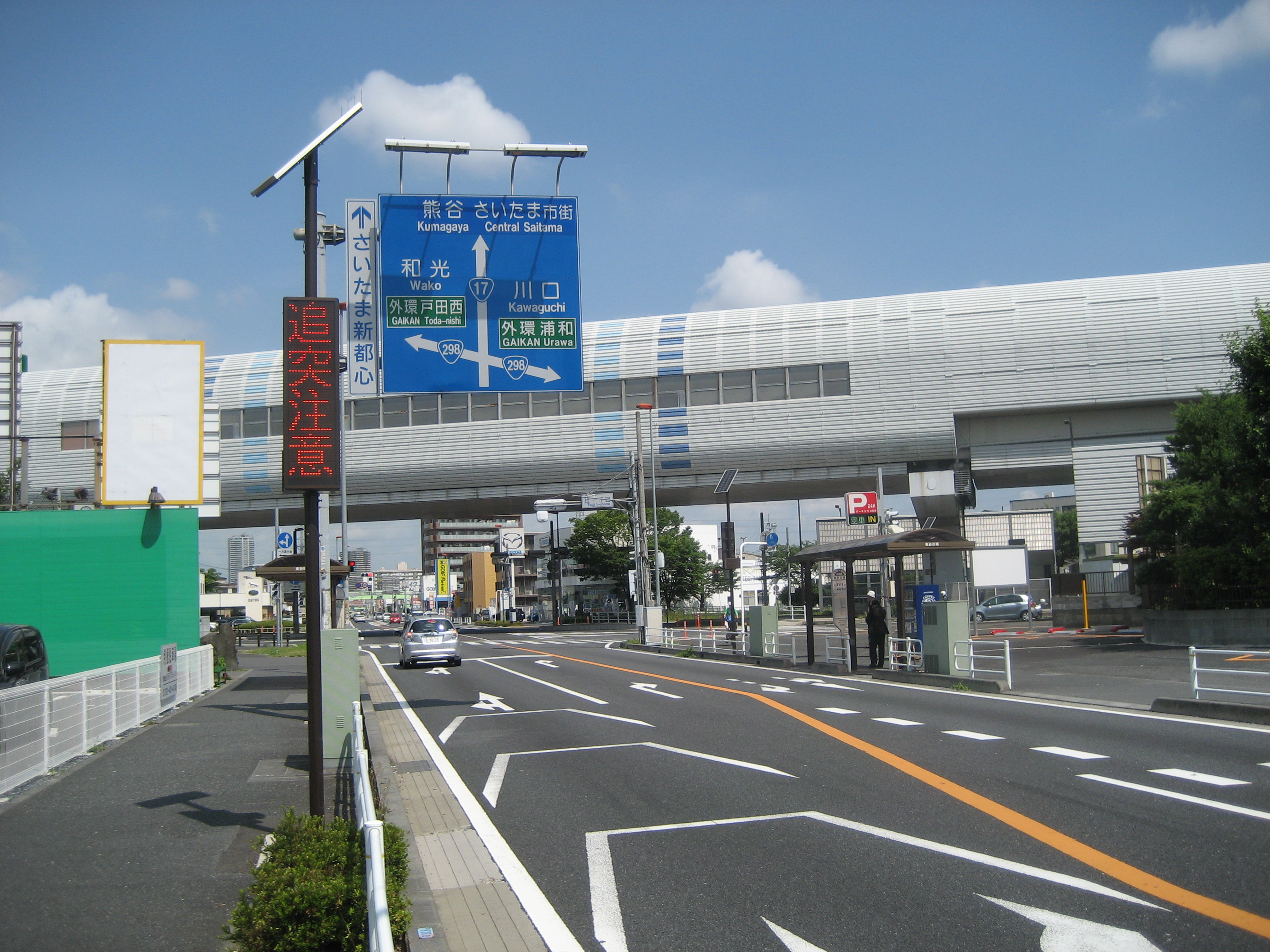 国道17号線さいたま市南区辻7丁目付近